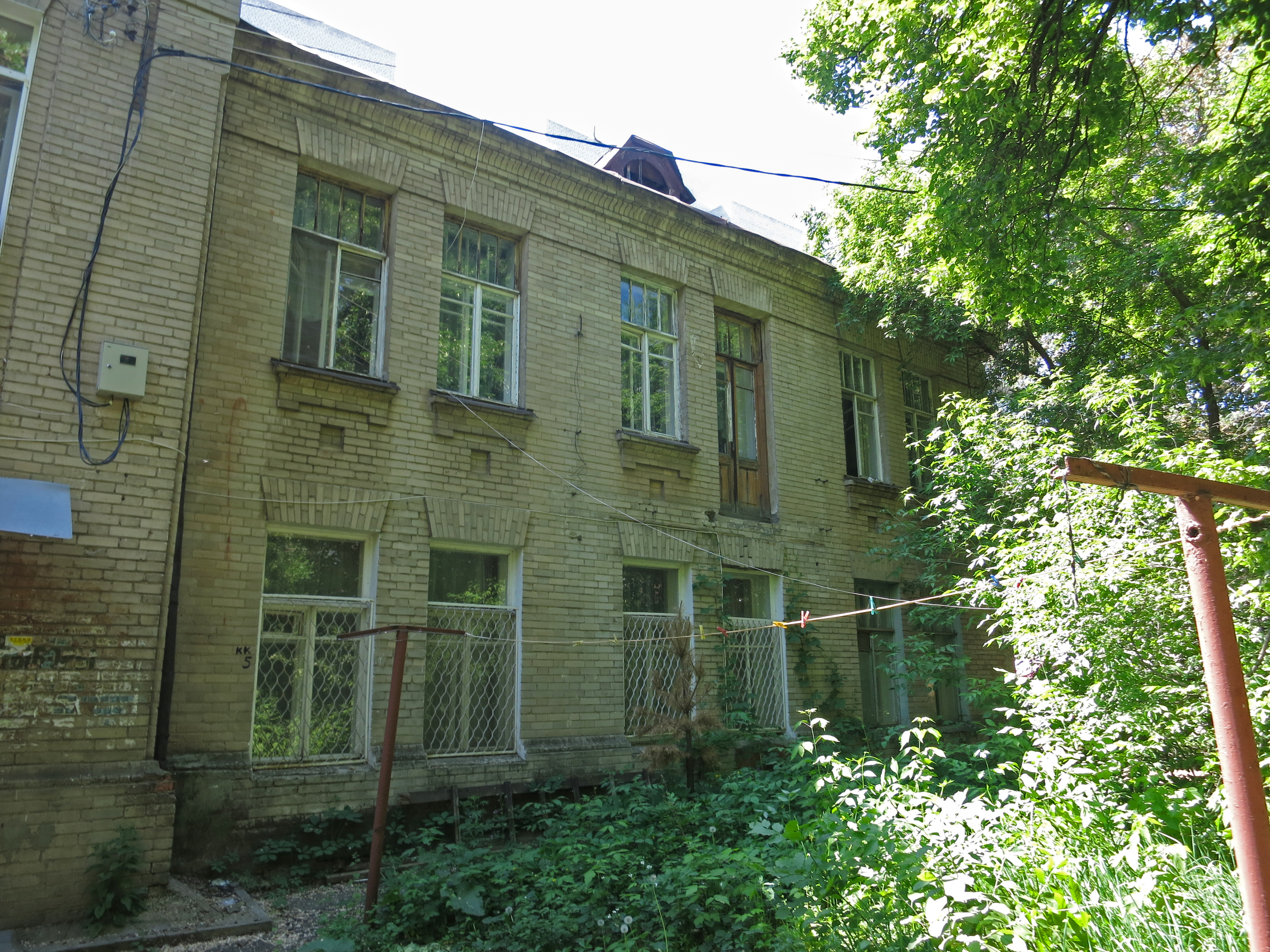 Дом жилой (Саратовская область, Саратов, Тулайкова улица, 3)